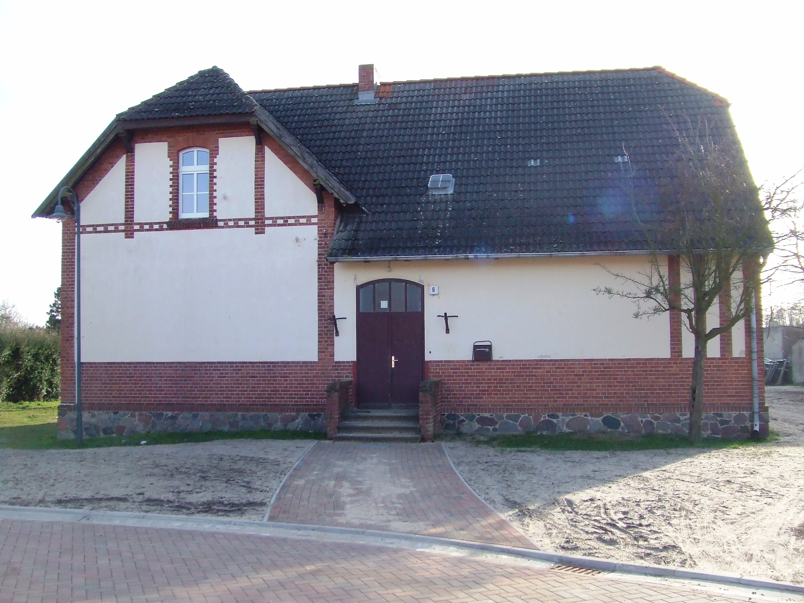 Bürgerhaus in Stüdenitz, Deutschland.